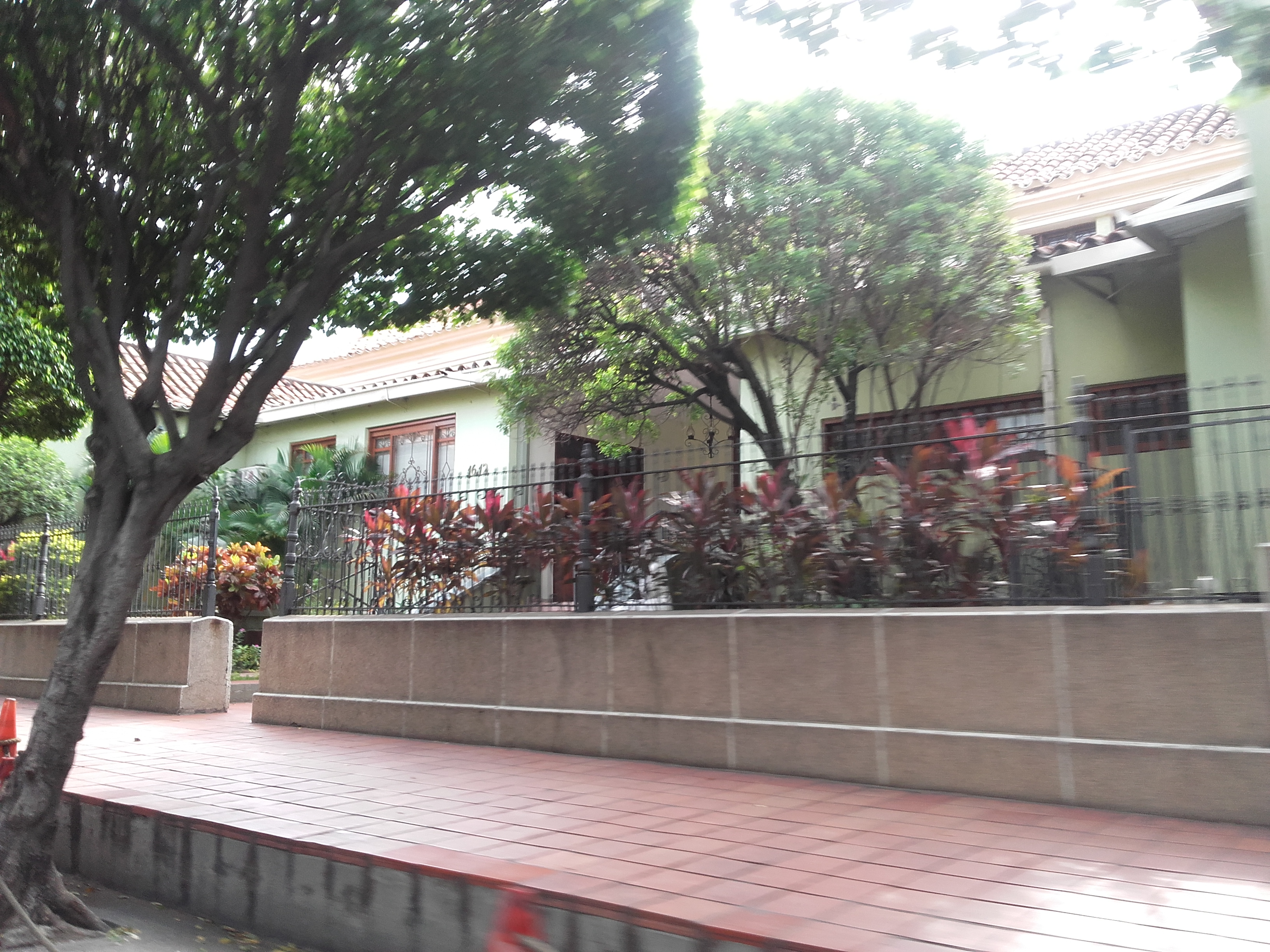 dmdmfmmfffm